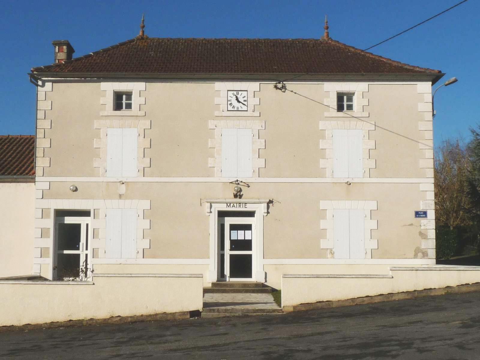 mairie de Luxé, Charente, France